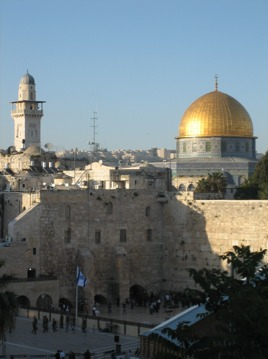 i Kupola nad Stijenom u Jeruzalemu.